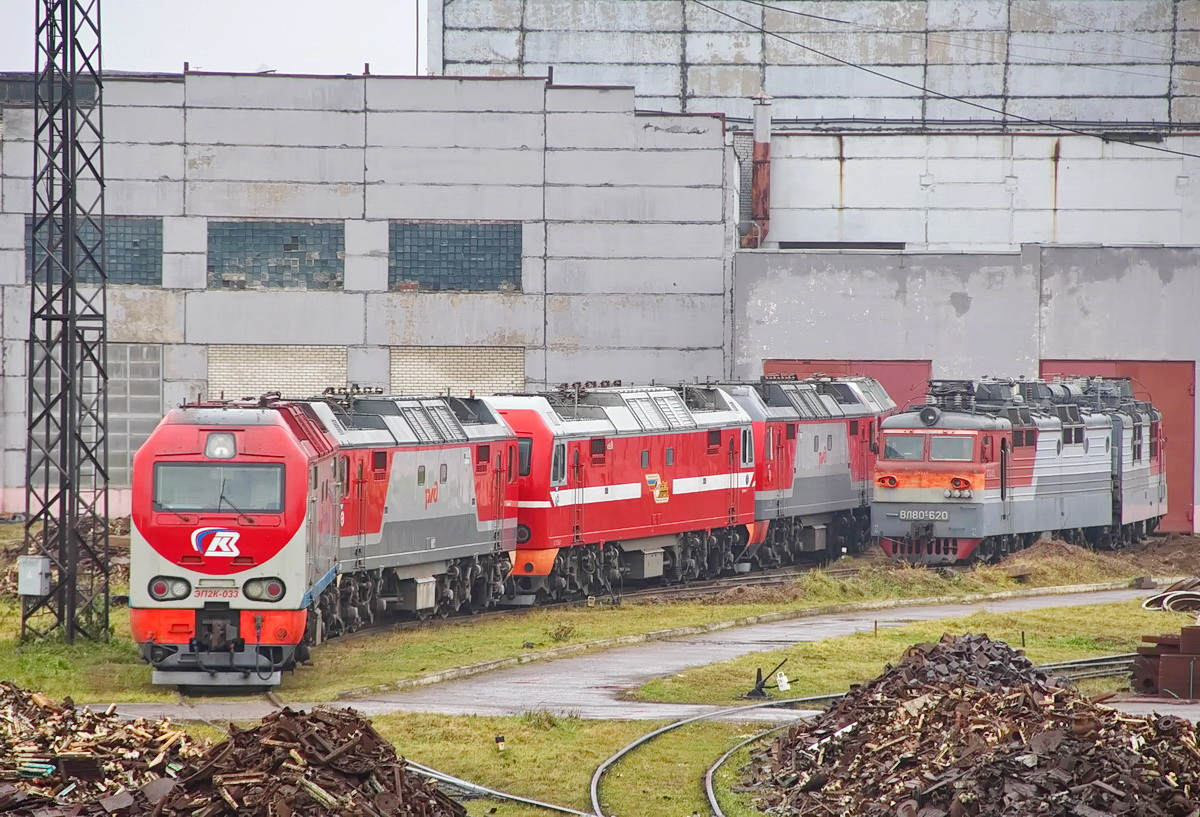 С завода поступил в депо Санкт-Петербург-Пассажирский-Московский (04.2009 г.) 5 октября 2011 — незакреплённый локомотив самопроизвольно пришёл в движение и упал в яму поворотного круга ТЧ-8 с повреждением ходовой части. СР Ярославский ЭРЗ 01.2018 г.